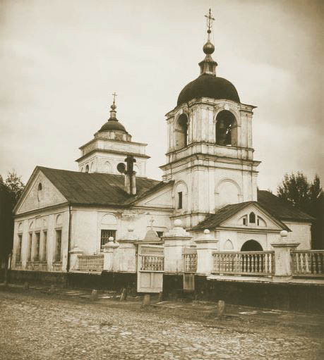 Церковь Ржевской иконы Божьей Матери на Поварской улице в Москве (снесена в 1950-е годы)